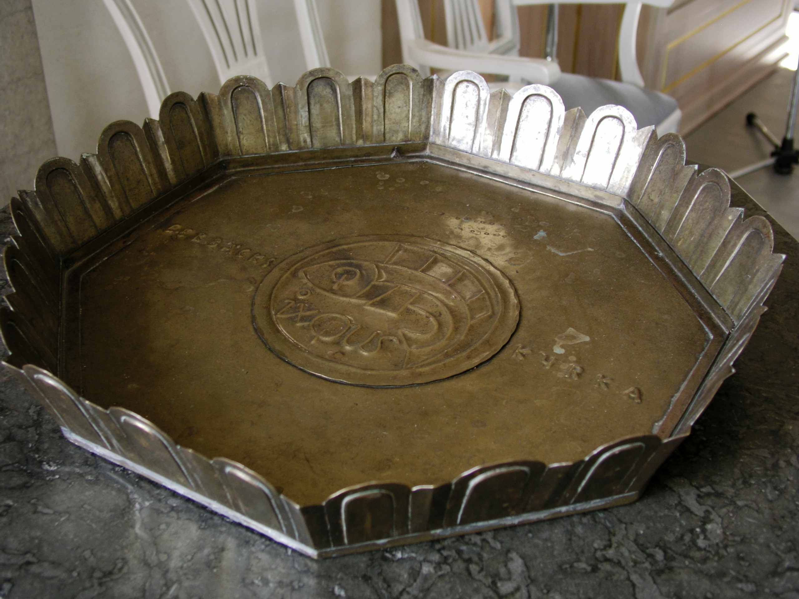 Lerbäcks kyrka, Askersund, Sweden. Baptismal font. Upper side.